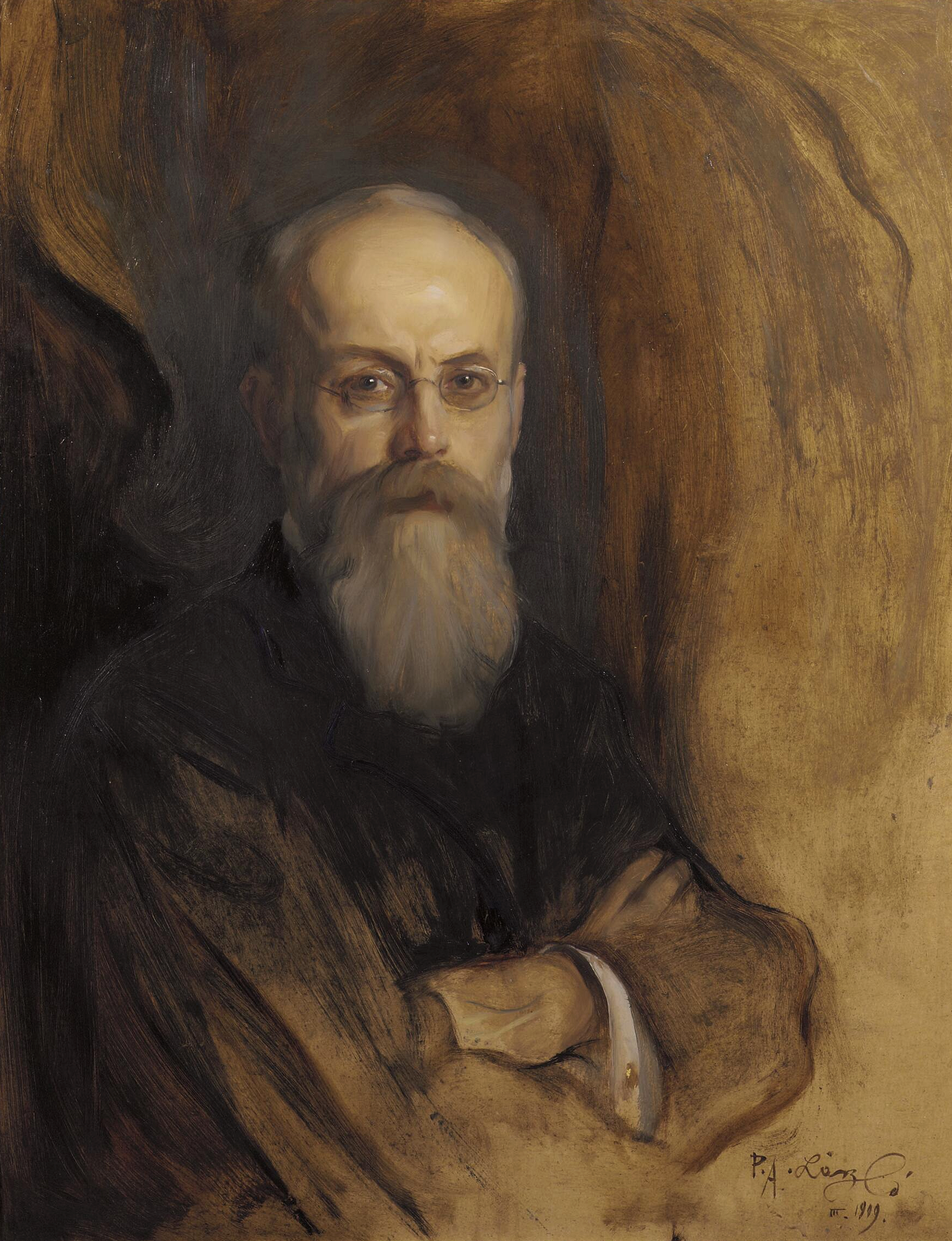 Portret van Jhr. mr. Theodorus Helenus Franciscus van Riemsdijk (1848-1923), 1909 gedateerd. Van Riemsdijk was een algemene rijksarchivaris.